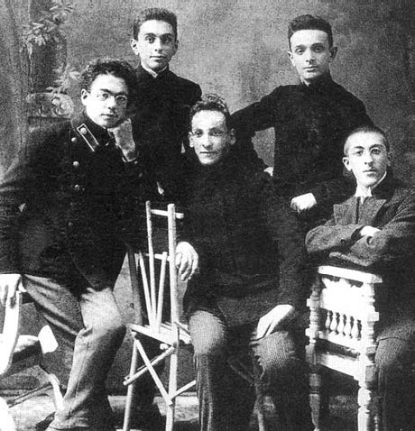 Міхаіл Кікоін (у першым шэрагу злева) і Файбіш-Шрага Царфін (у другім шэрагу справа), Вільня